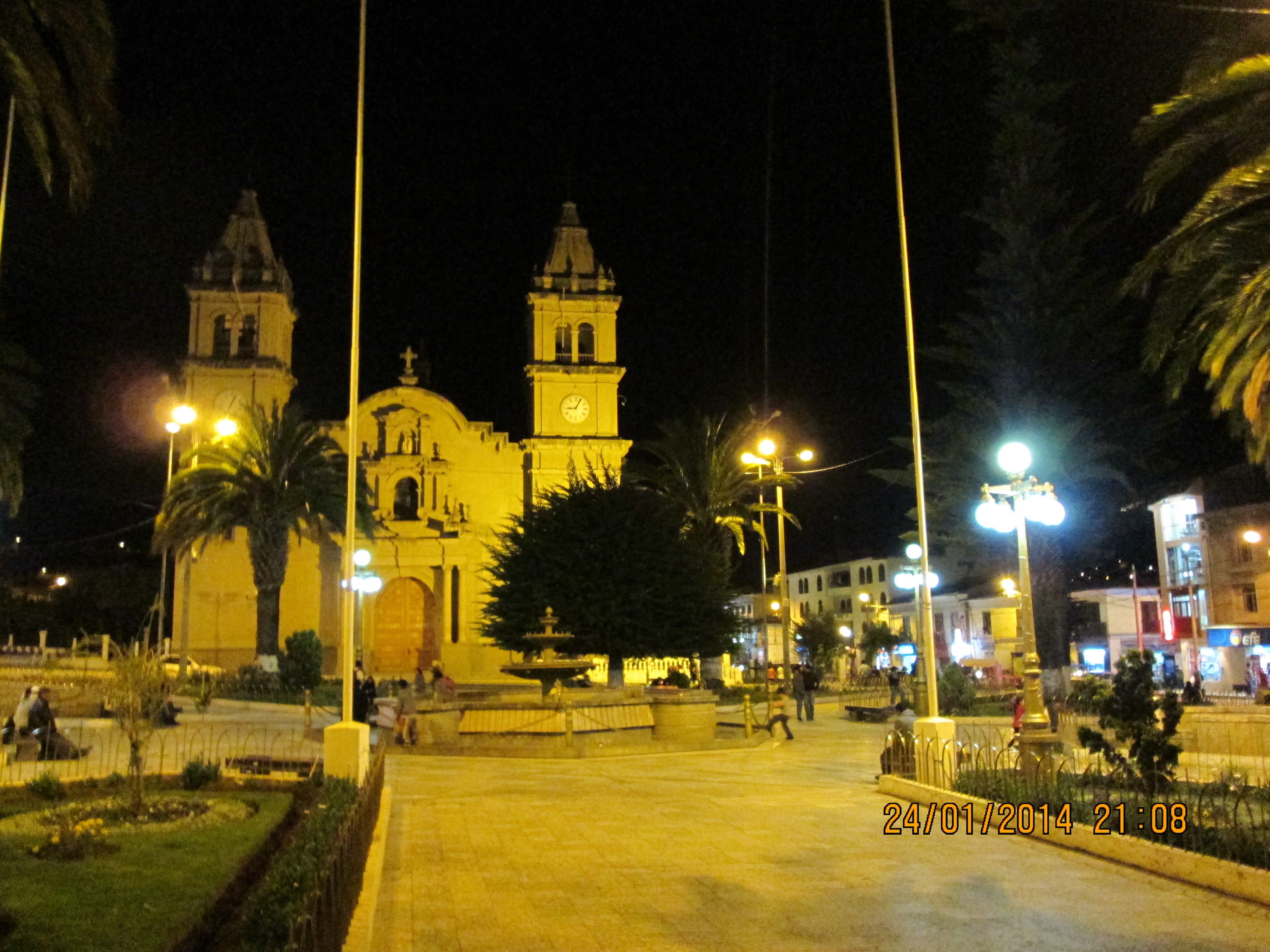 TARMA DE NOCHE